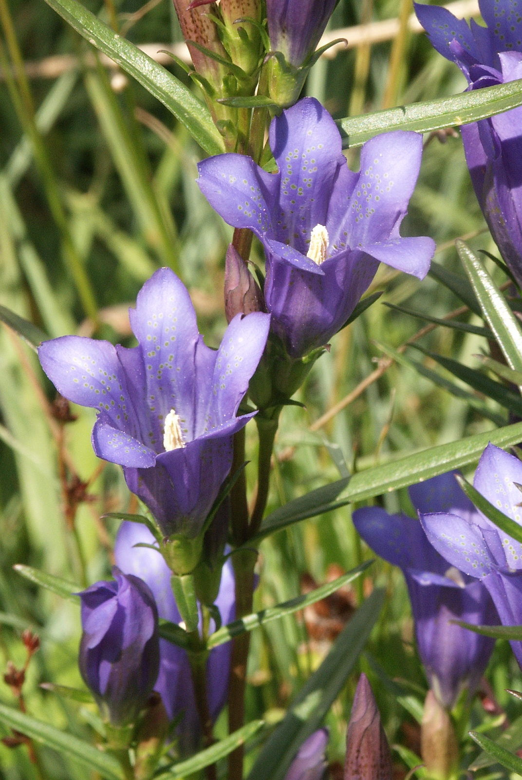 Gentiana pneumonanthe, Schwäbische Alb, Germany